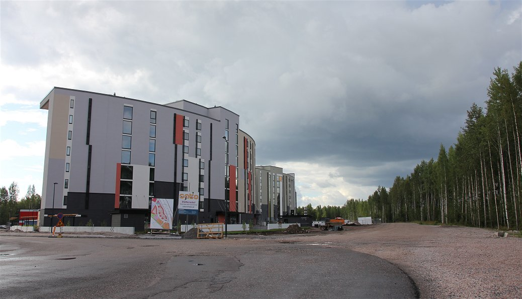 Keimolanmäki (ruots. Käinbybacken) on rakenteilla oleva (tilanne 2016) asuntoalue Vantaan länsiosissa, Kivistön suuralueen Keimolan kaupunginosassa, vilkkaan Hämeenlinnanväylän länsipuolella. Hämeenlinnan väylän tieliikenteen synnyttämä taustamelu kuuluu selkeästi asuinalueen ulkotiloissa. Kaupunginosan ensimmäiseen kerrostaloriviin (kuvassa) ei ole osin tästä syystä esimerkiksi rakennettu asuinhuoneistojen parvekkeita valtatien puoleiselle sivulle. Hämeenlinnan väylä kulkee kuvan oikeassa laidassa näkyvän lehtipuuvoittoisen sekametsäkaistaleen takana.